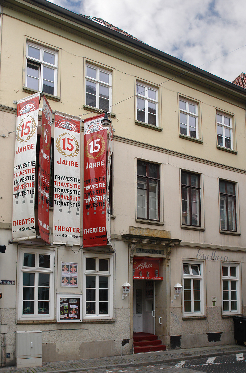 Bremen: Theater Madame Lothár im Schnoor.Das abgebildete Objekt ist ein geschütztes Kulturdenkmal in der Freien Hansestadt Bremen, mit der Nr. 1167 beim Landesamt für Denkmalpflege registriert.